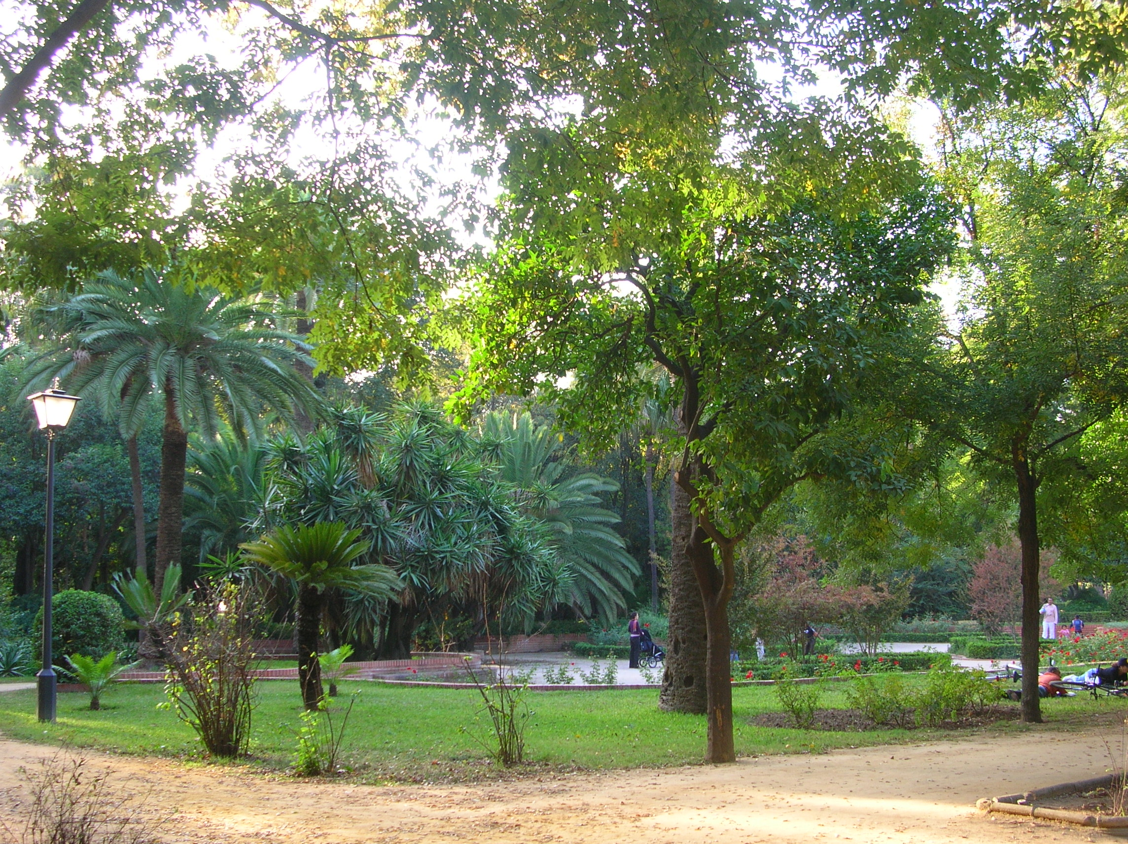 Parc de Maria Luisa (Séville)